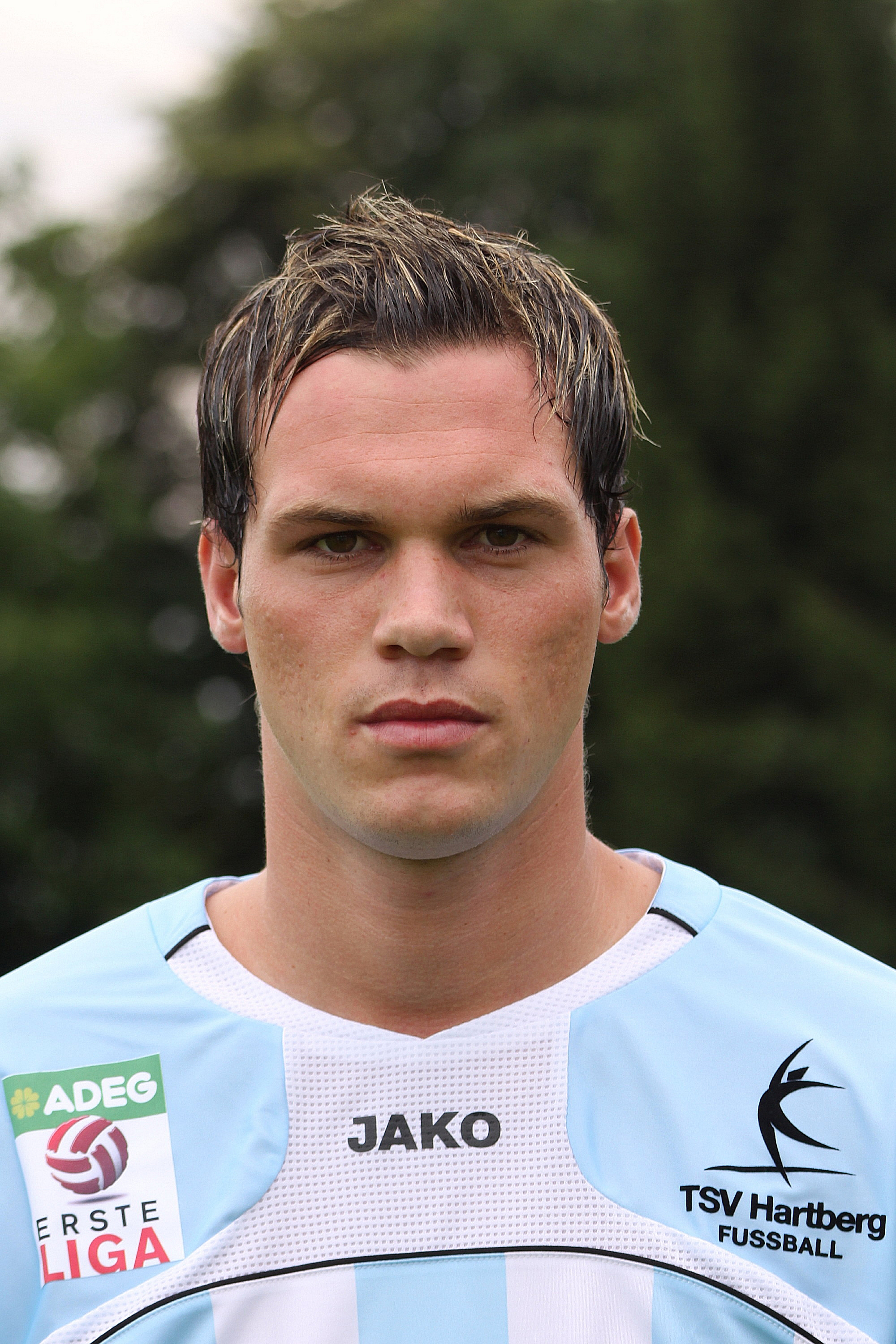 Patrick Bürger - TSV Hartberg (1)